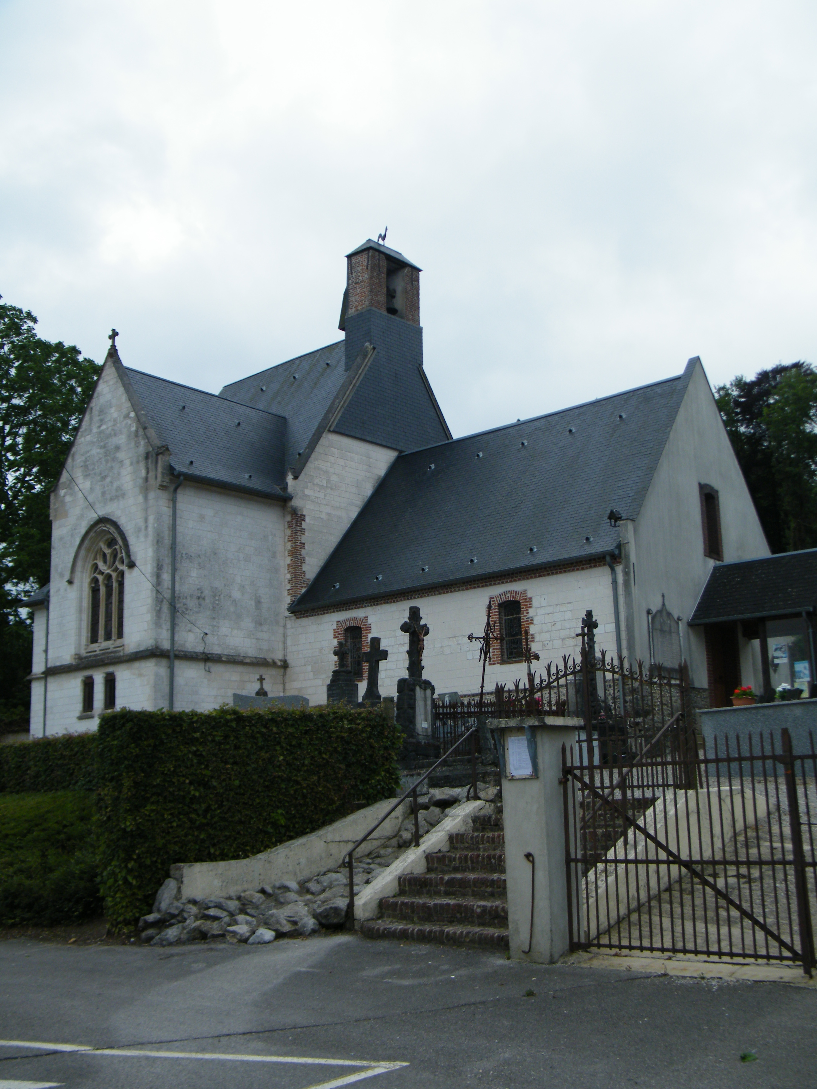 Église, La Calotterie, Pas-de-Calais, France